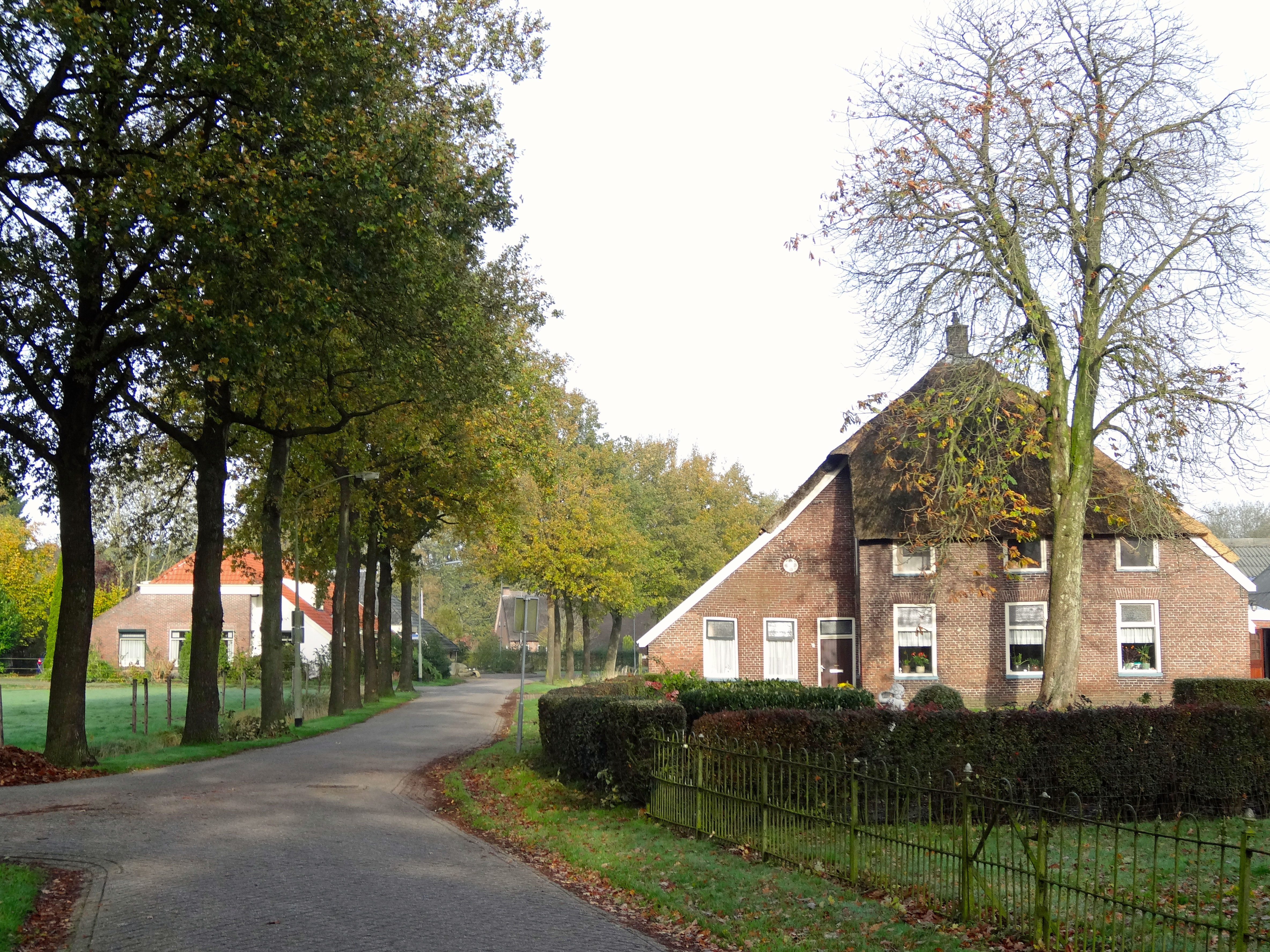 Dorpsgezicht Drouwen - Alinghoek